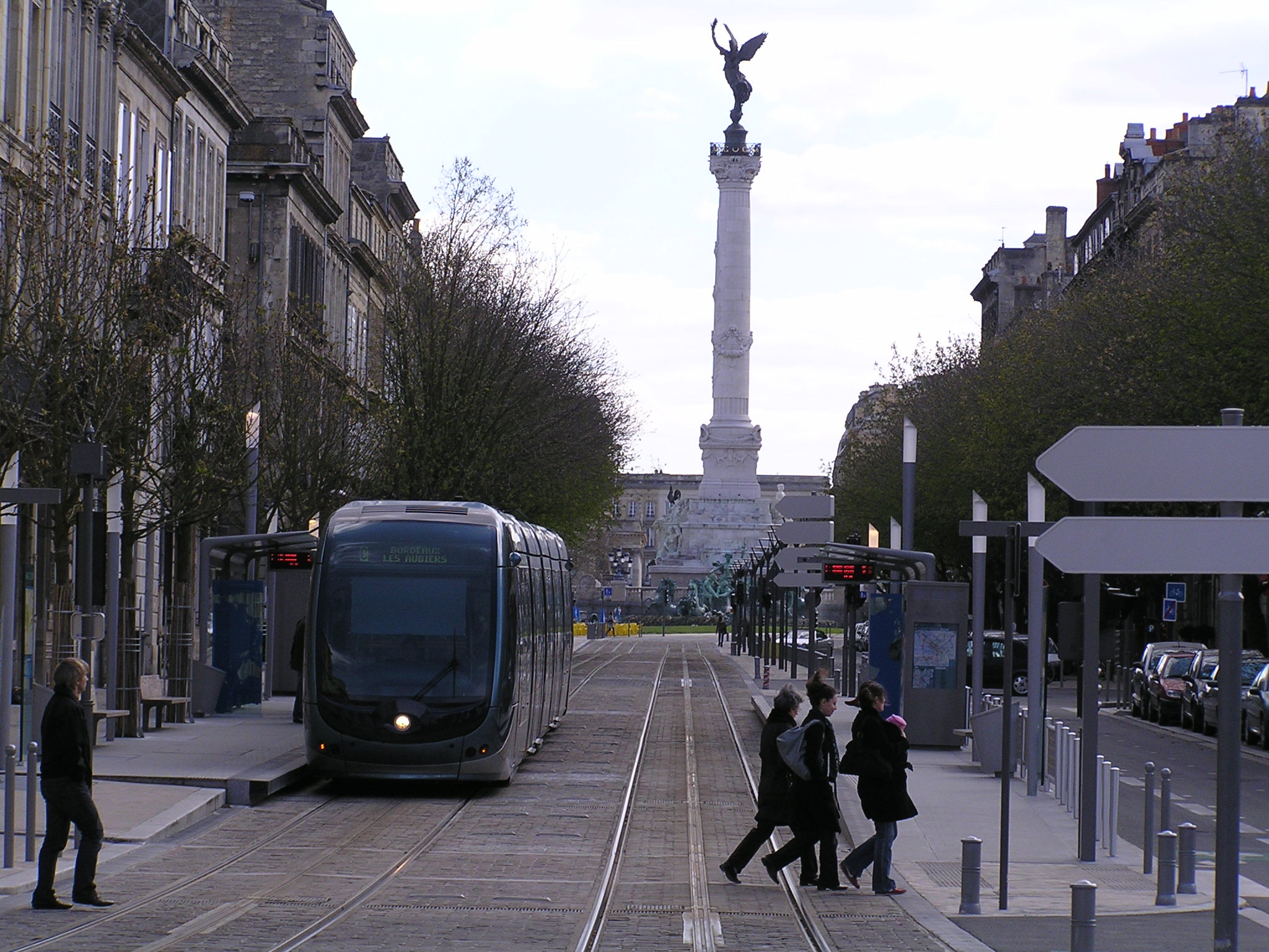 Bordeaux : Tramway ("tram") et Statue de la liberté du monument Girondins de la Place des Quinconces